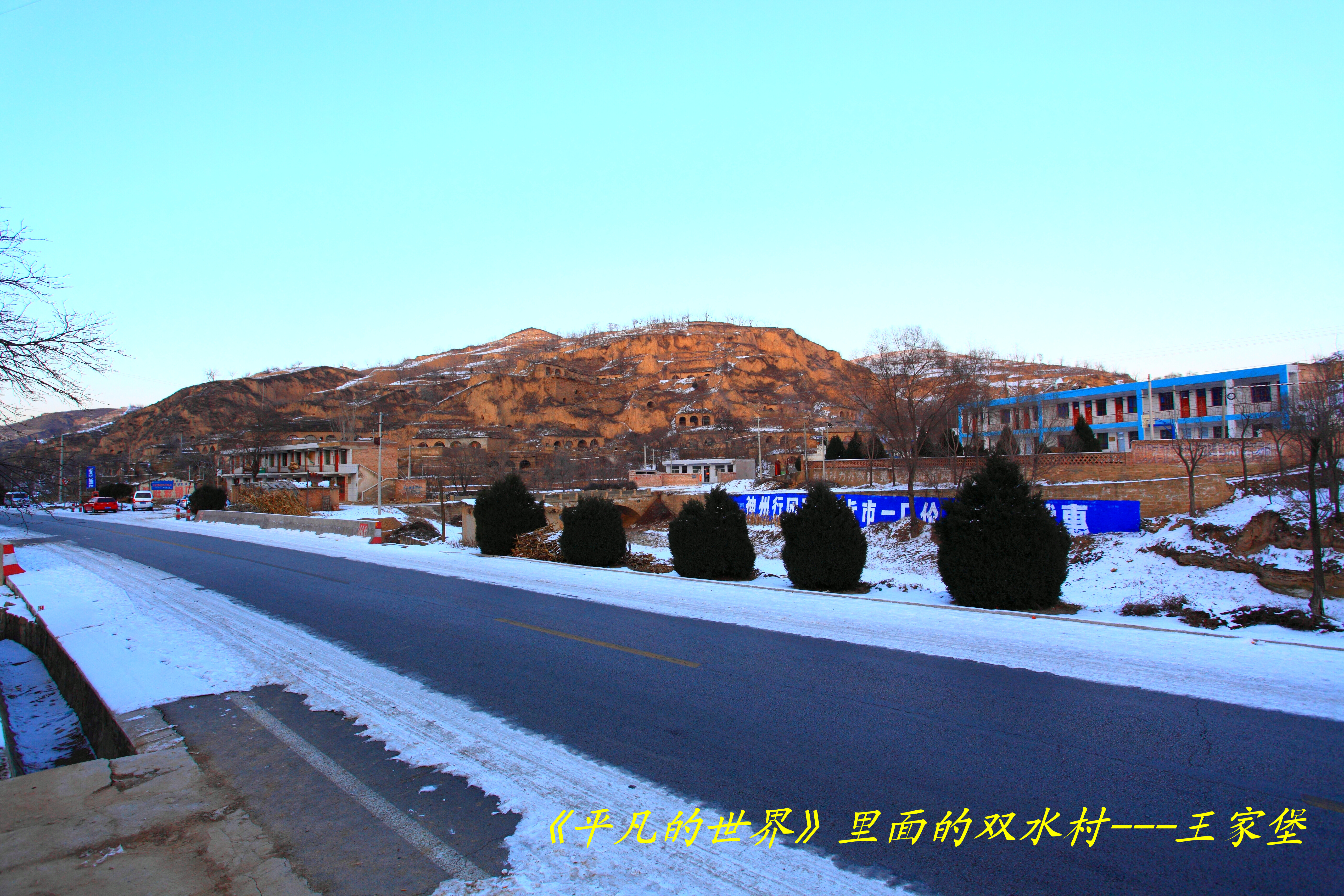 路遥故里行